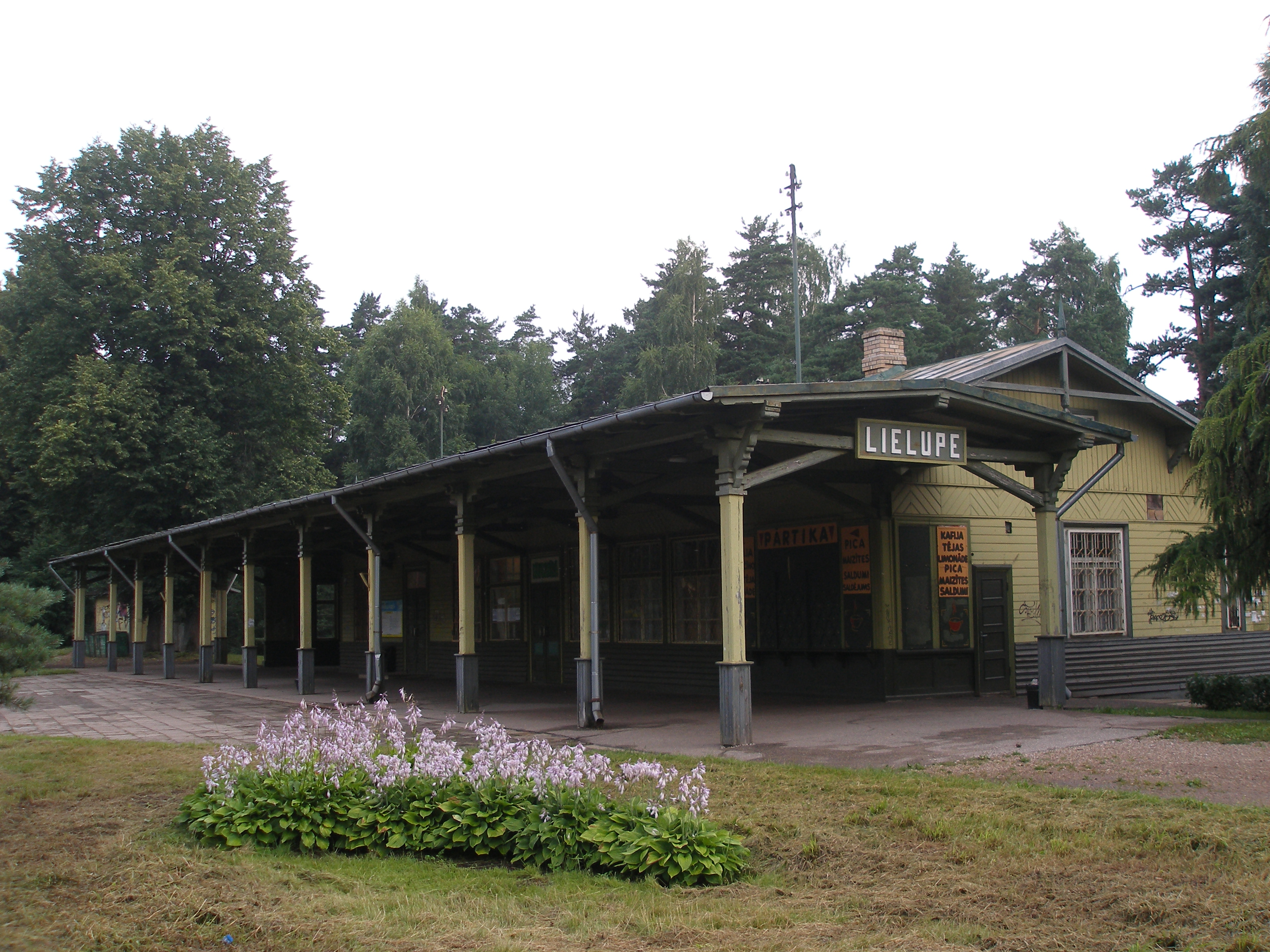 Lielupes stacijas ēka